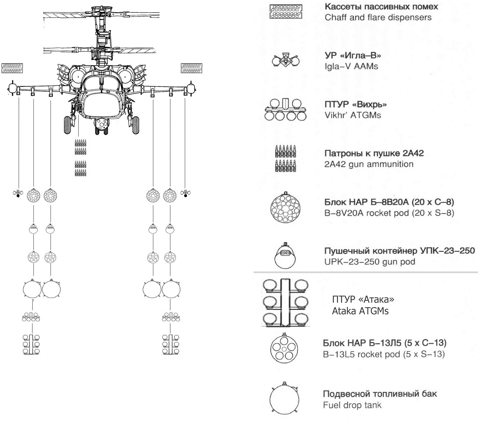 Схема подвесок оружия на серийный вертолёт Ка-52